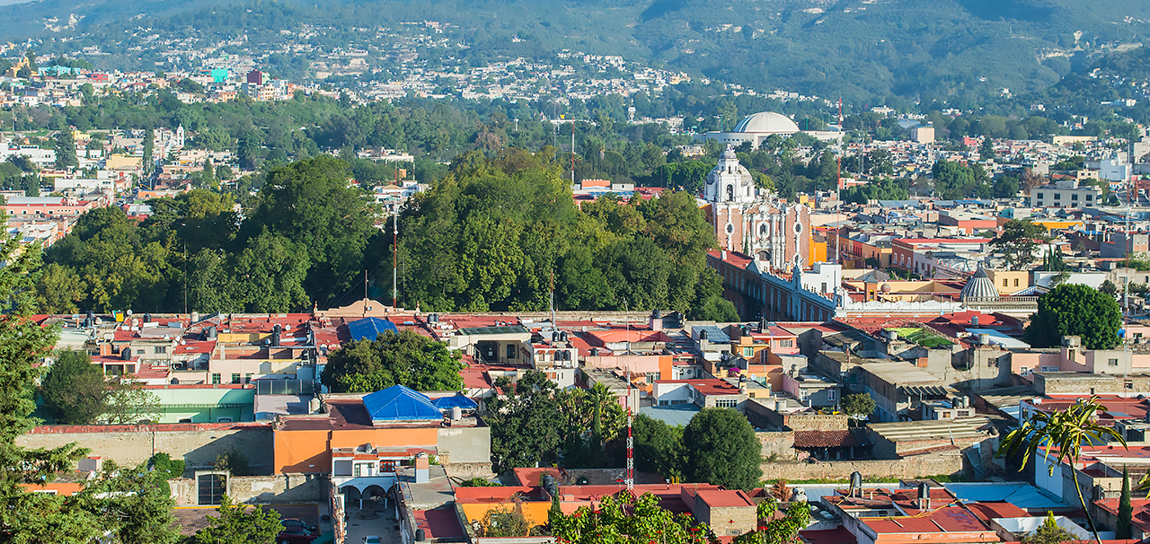 Zona de monumentos históricos, patrimonio de la nación.